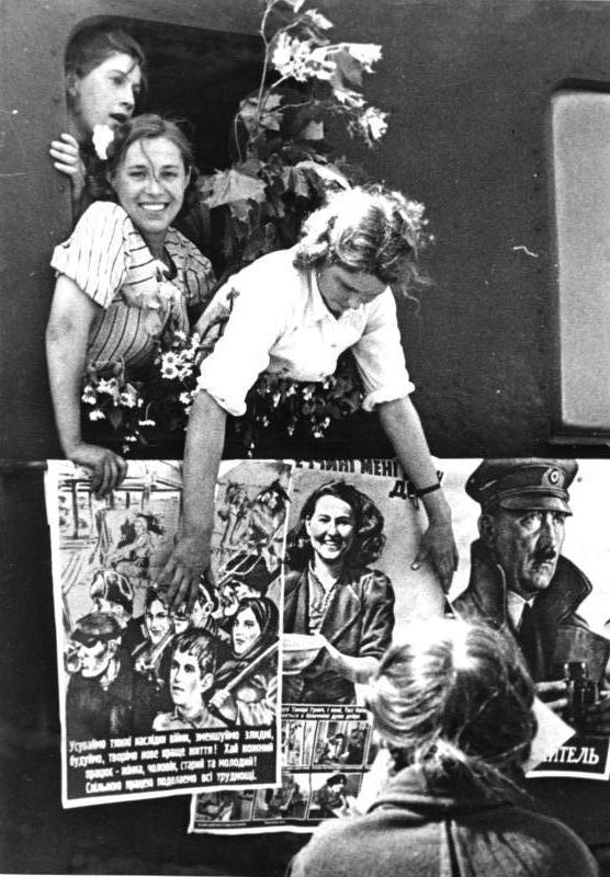 ADN-ZB-Archiv II.Weltkrieg 1939-45 In den von der faschistischen deutschen Wehrmacht besetzten Gebieten der Sowjetunion, Mai 1943 Zum Arbeitseinsatz in Deutschland verpflichtete junge Ukrainerinnen verlassen mit der Eisenbahn ihre Heimat. Aufnahme: Kurrasch Scherl Bilderdienst, Freiwillige Ostarbeiter kommen nach Deutschland. Im geschmückten Eisenahnzug und mit frohen, erwartungsvollen Minen verlassen die jungen Ukrainerinnen ihre Heimat, um sich in Deutschlandn durch ihre Arbeit für das siegreiche Gelingen des großen Kampfes einzusetzen. PK: Kurrasch [Mai 1943]